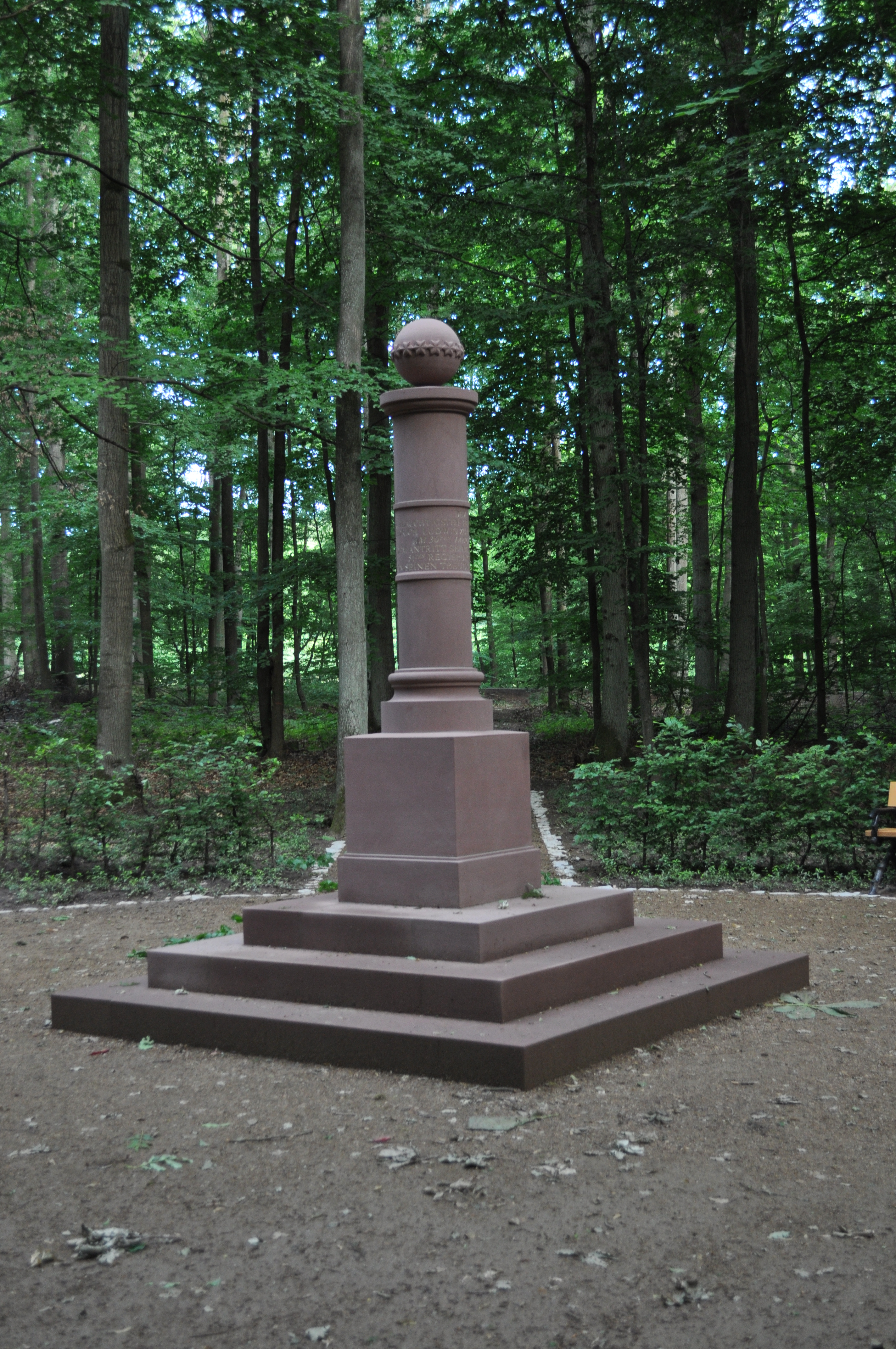 Landgrafensäule nahe dem gotischen Haus in Bad-Homburg Dornholzhausen